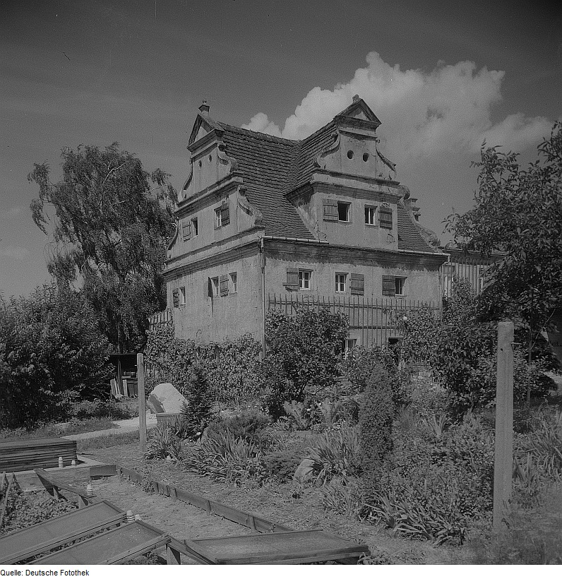 Original image description from the Deutsche Fotothek Radebeul. sog. Bennoschlößchen, auch Bennohaus, um 1600